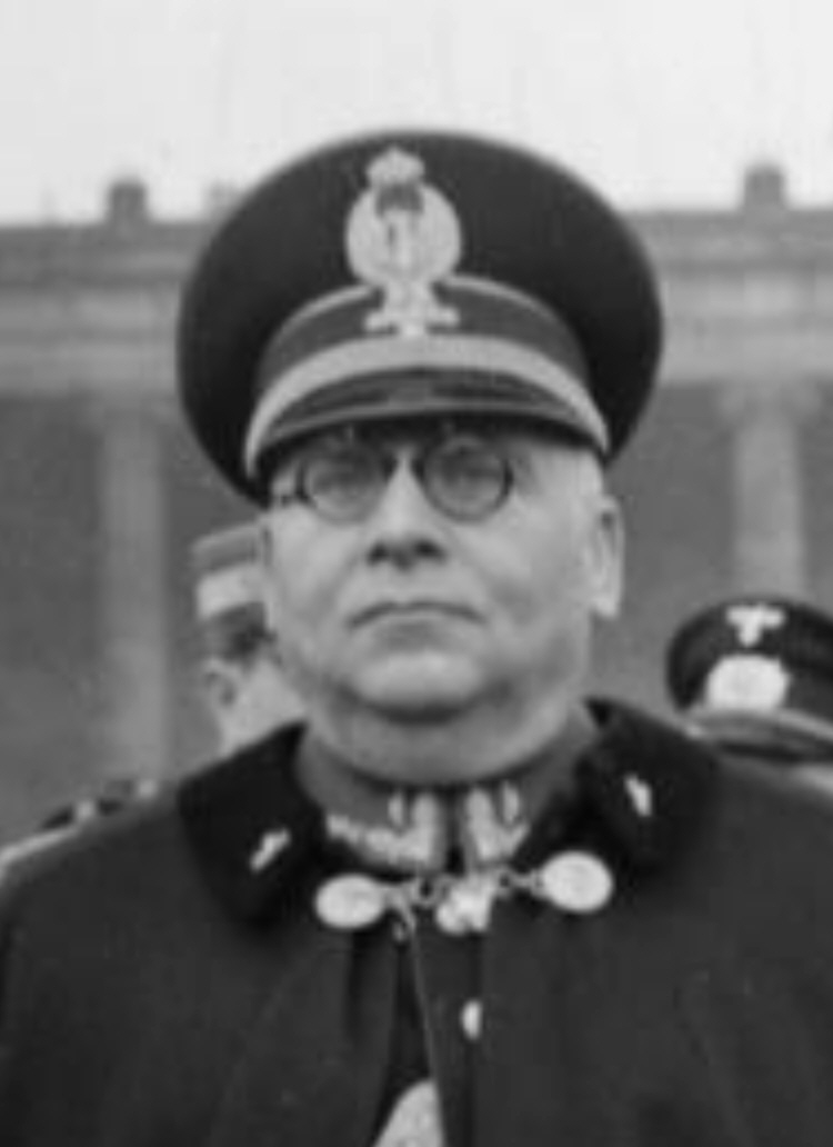 Arturo Bocchini (San Giorgio La Montagna, 12 febbraio 1880 – Roma, 20 novembre 1940)